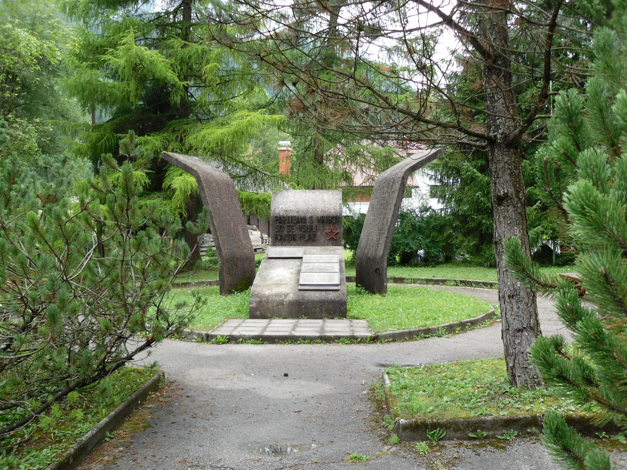 Koprivna - spomenik NOB